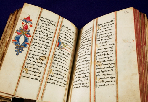 სომხური ხელნაწერი ხელნაწერთა ეროვნულ ცენტრში